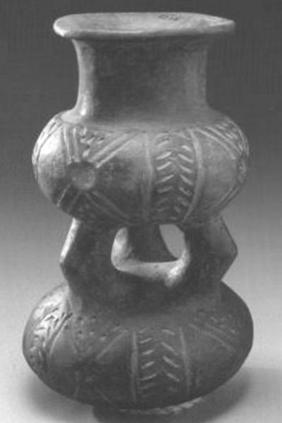 Vasija de la cultura capacha, del período clásico temprano de Mesoamérica. La pieza forma parte de la colección del Museo Nacional de Antropología de México.